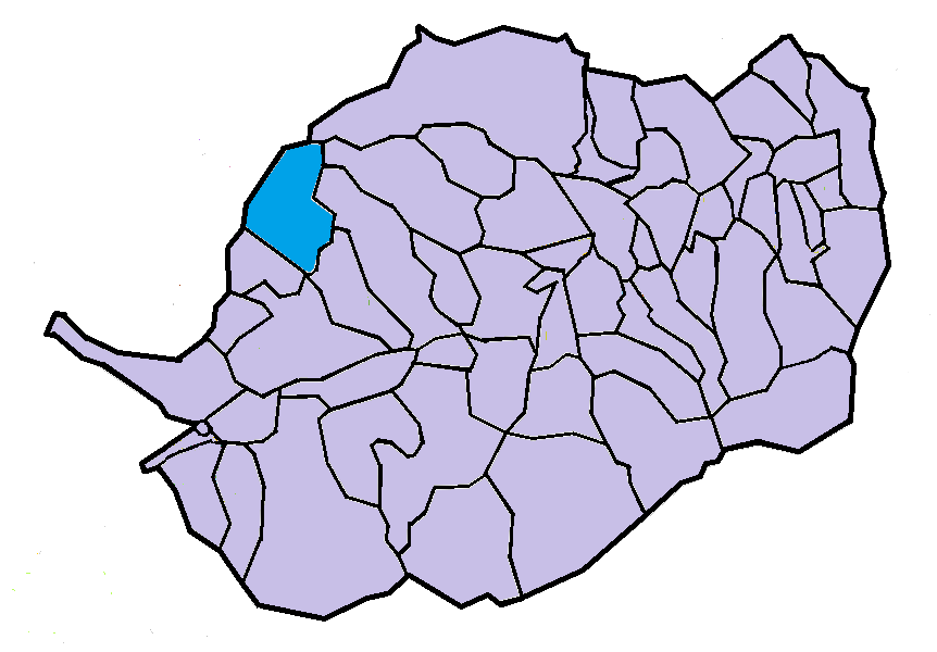 Censà en el Conflent, a partir del mapa municipal del Conflent de lliure disposició adaptat al Nomenclàtor toponímic aprovat el 2007